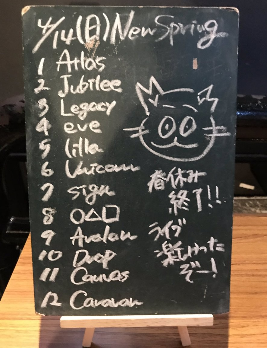 amiinAセトリボード